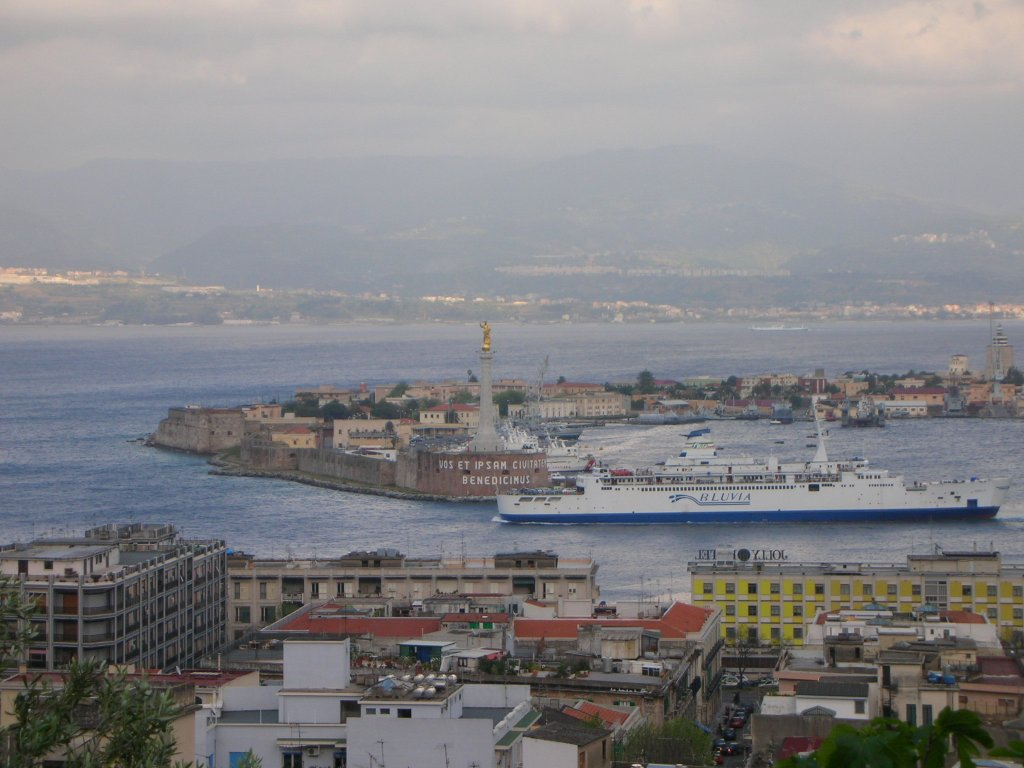 Porto di Messina